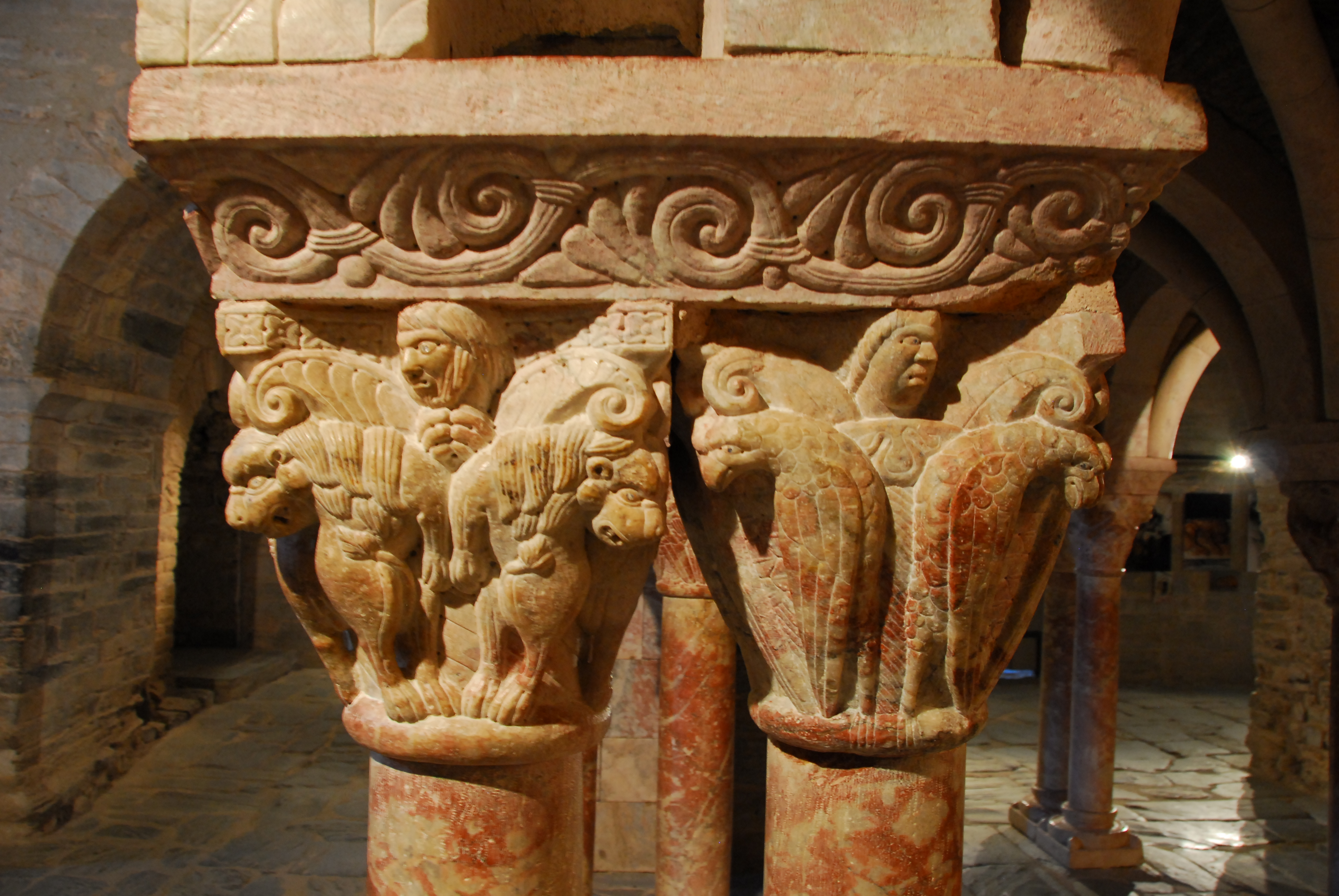 Serrabone, Empore, Kapitelle Nr 8+9